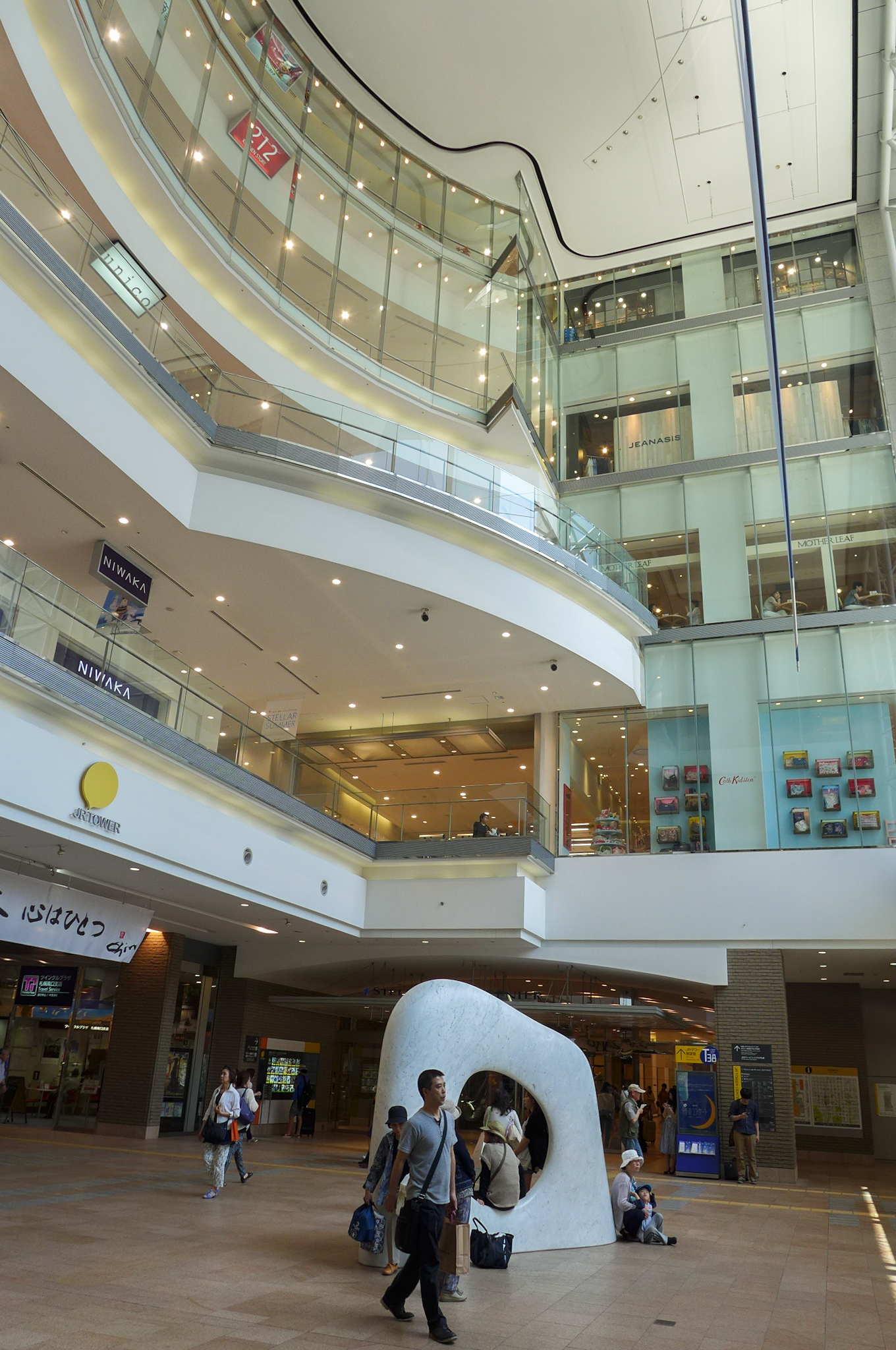 Stellar Place Sapporo